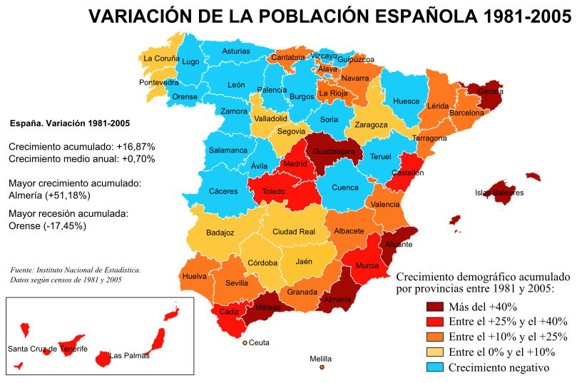 Mapa de España con las variaciones de población por provincias en el periodo 1981-2005, según los censos correspondientes del Instituto Nacional de Estadística.